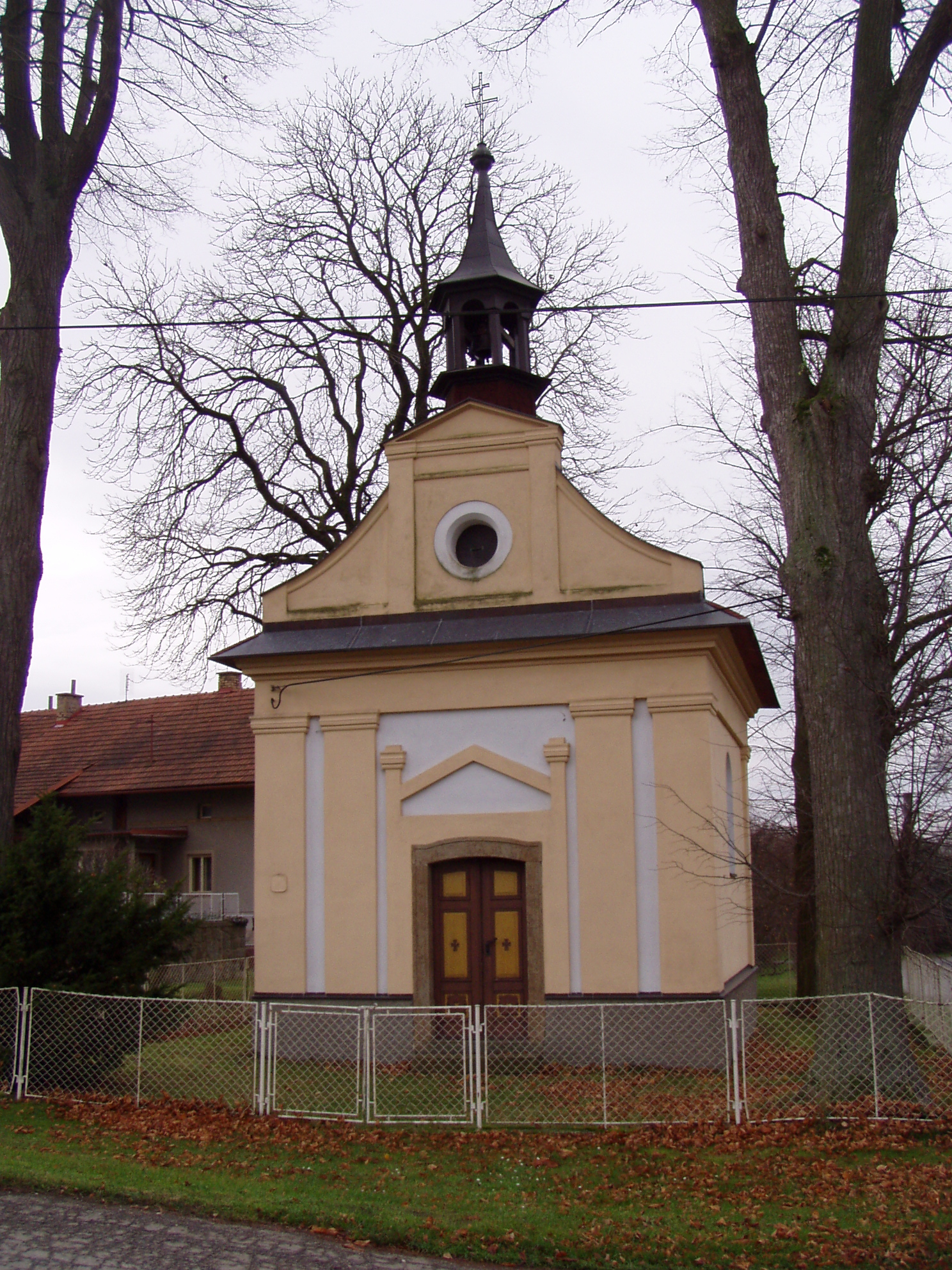 Kaple sv. Cyrila a Metoděje (Byzhradec)